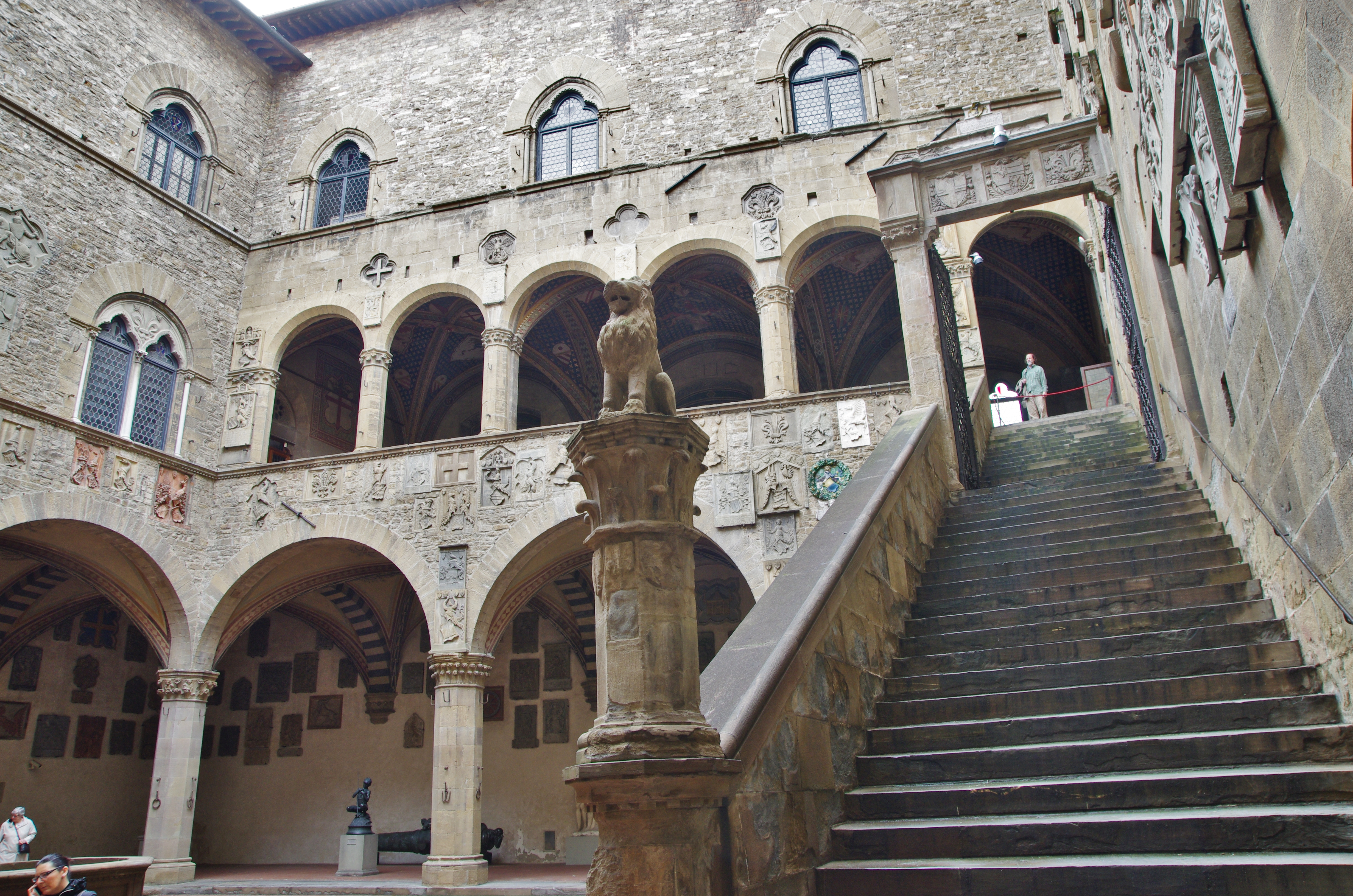 03 2015 Cortile-scalone-loggia-stemmi-bifora-volte a crocera, finestre polilobate cuspidate-ordine corinzio-pilastri ottagonali-leone-Museo nazionale del Bargello (Firenze) Photo Paolo Villa FOTO9234bisimg 0001